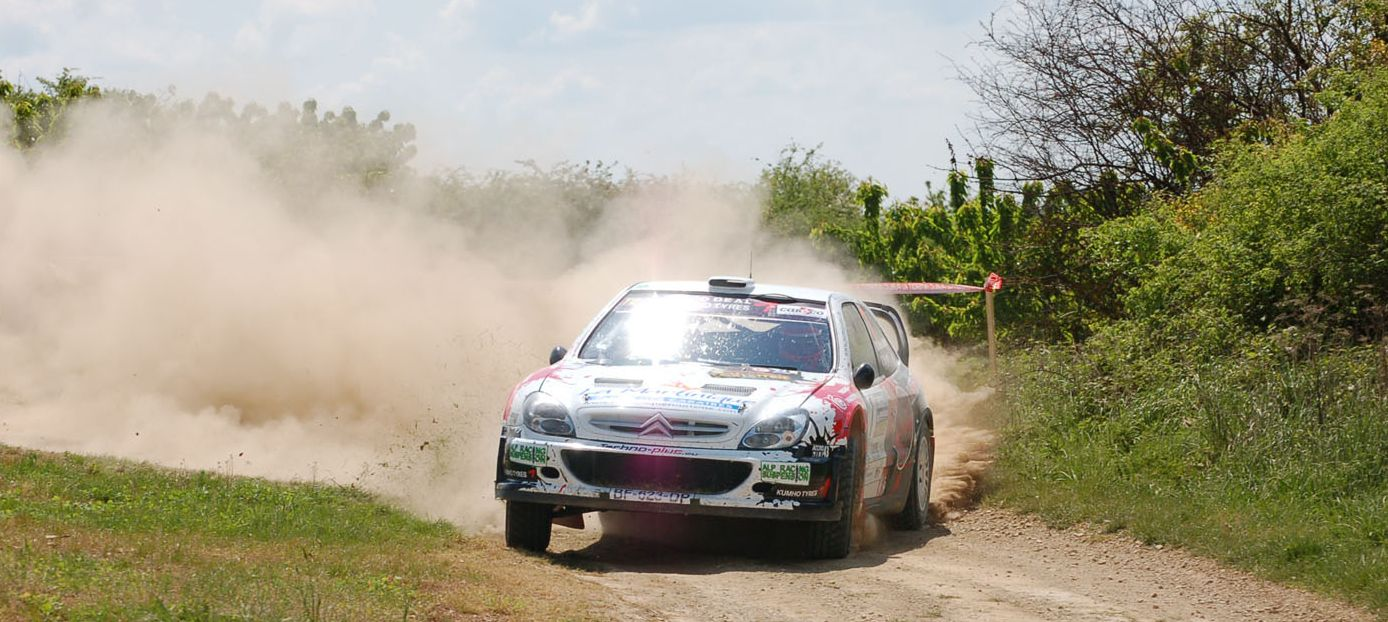 Jean-Joseph - Boyere au Rallye Terre de l'Auxerrois 2011